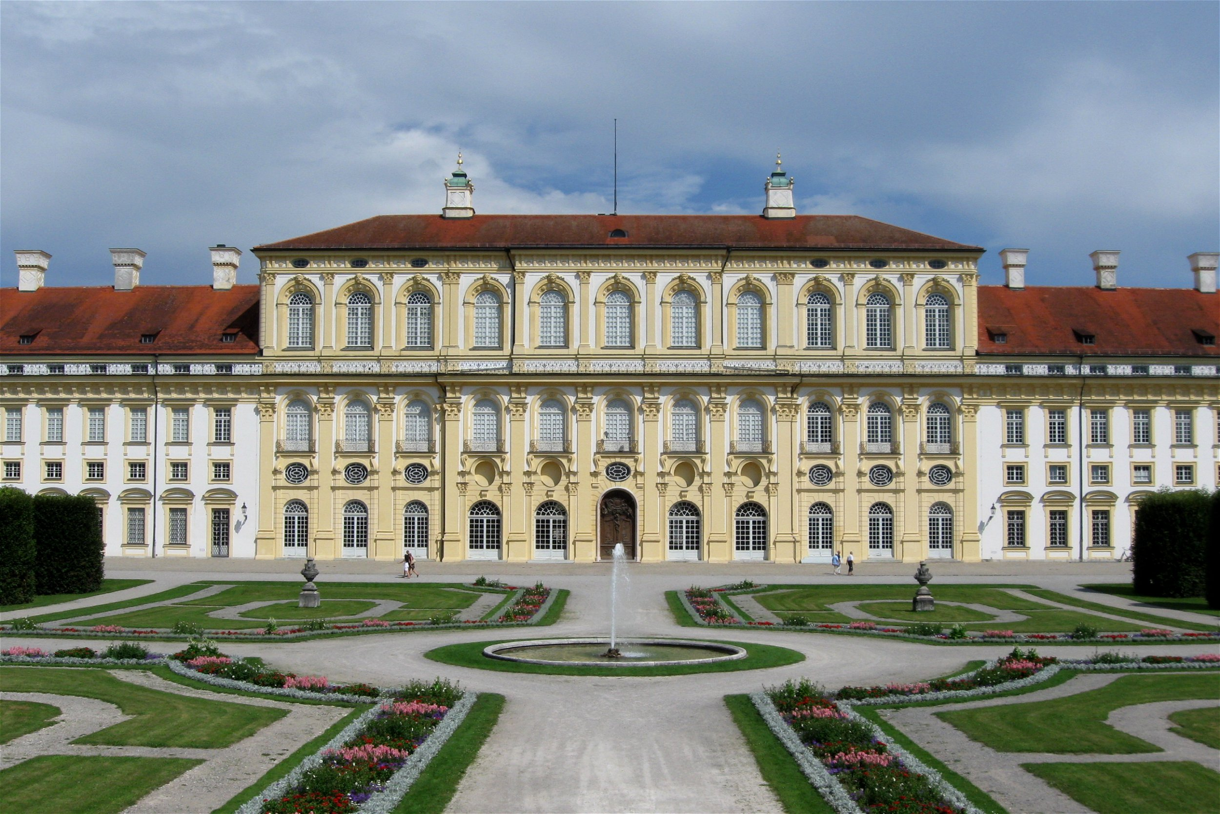 Neues Schloss Schleissheim, Westseite